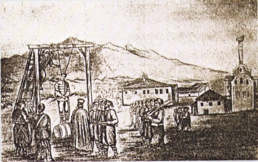 Рисунка на обесването на Васил Левски от Симеон Симеонов-Моната (преди 1881)